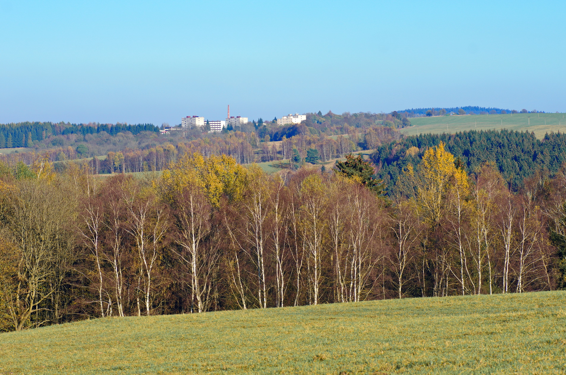 pohled přes údolí Velké Libavy na obec Rovnou ve Slavkovském lese, okres Sokolov